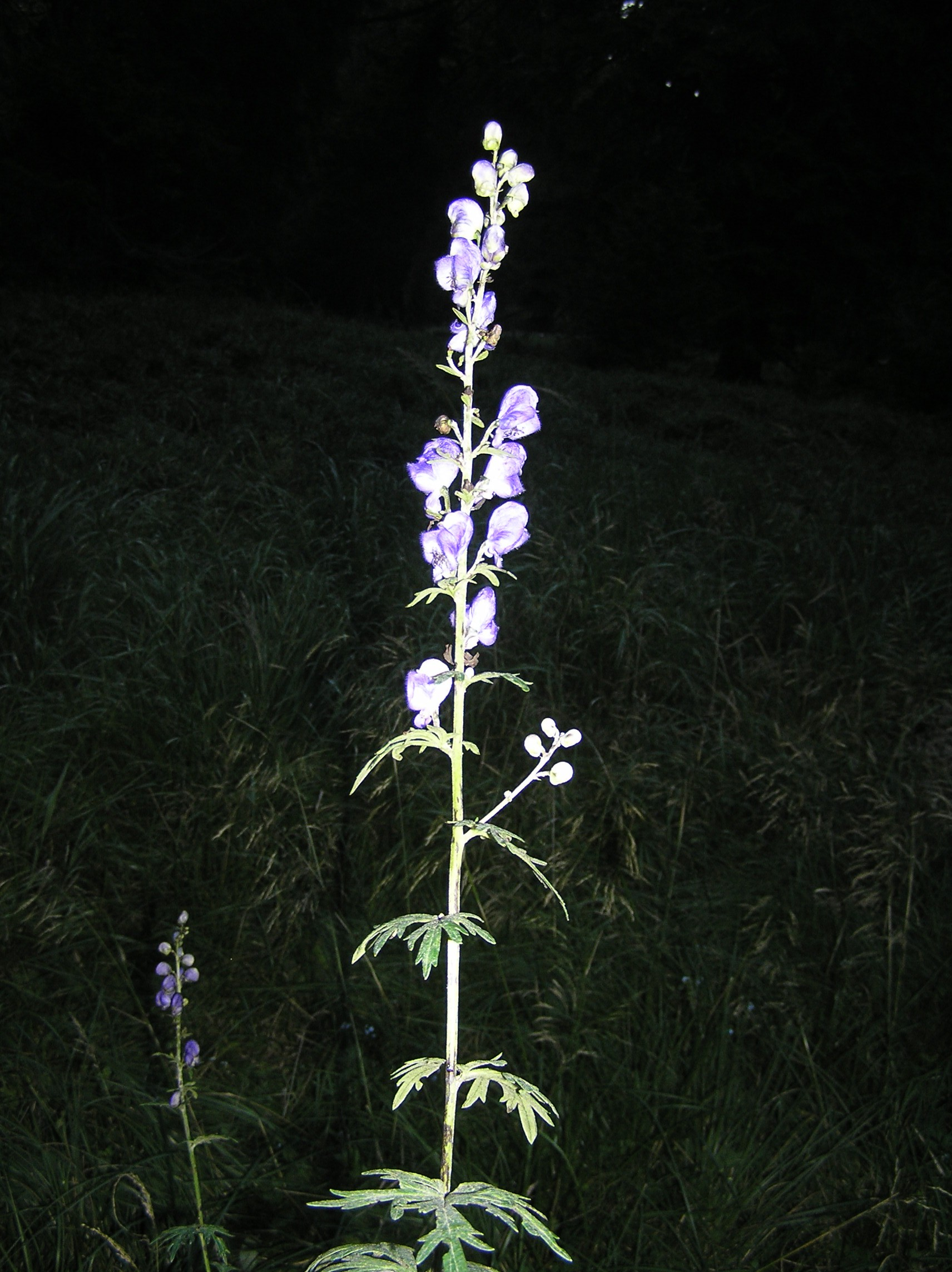 Aconitum plicatum, Králický Sněžník, Czech Republic